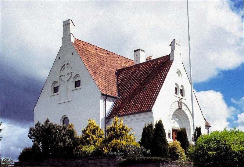 Morild Kirke i Danmark. Morild kirke